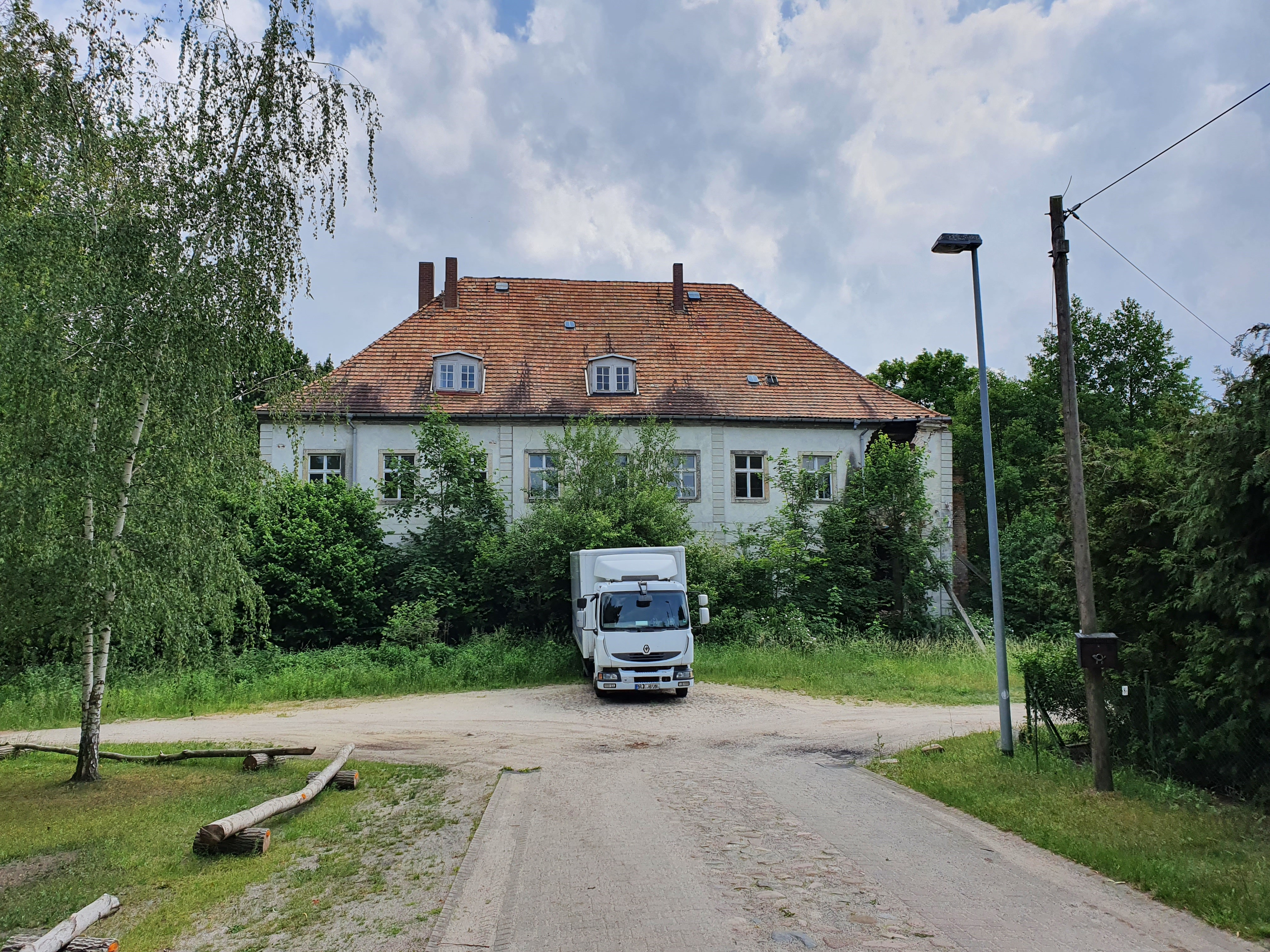 Das denkmalgeschützte Schloss Neudöbern im Juni 2020.